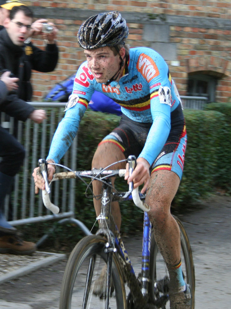 Niels Albert tijdens het WK veldrijden Hooglede-Gits 2007 Beloften